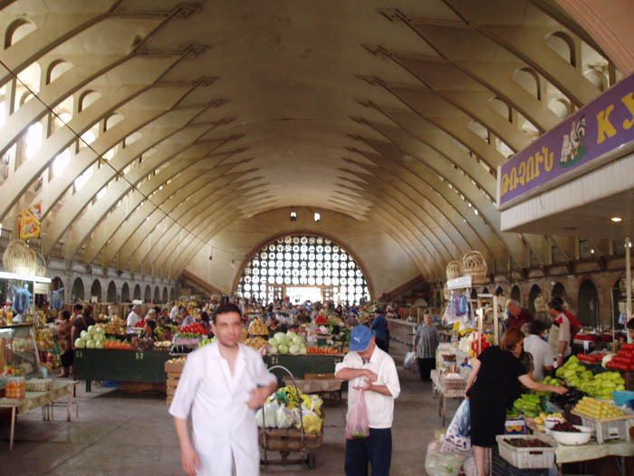 MErcado de Yerevan